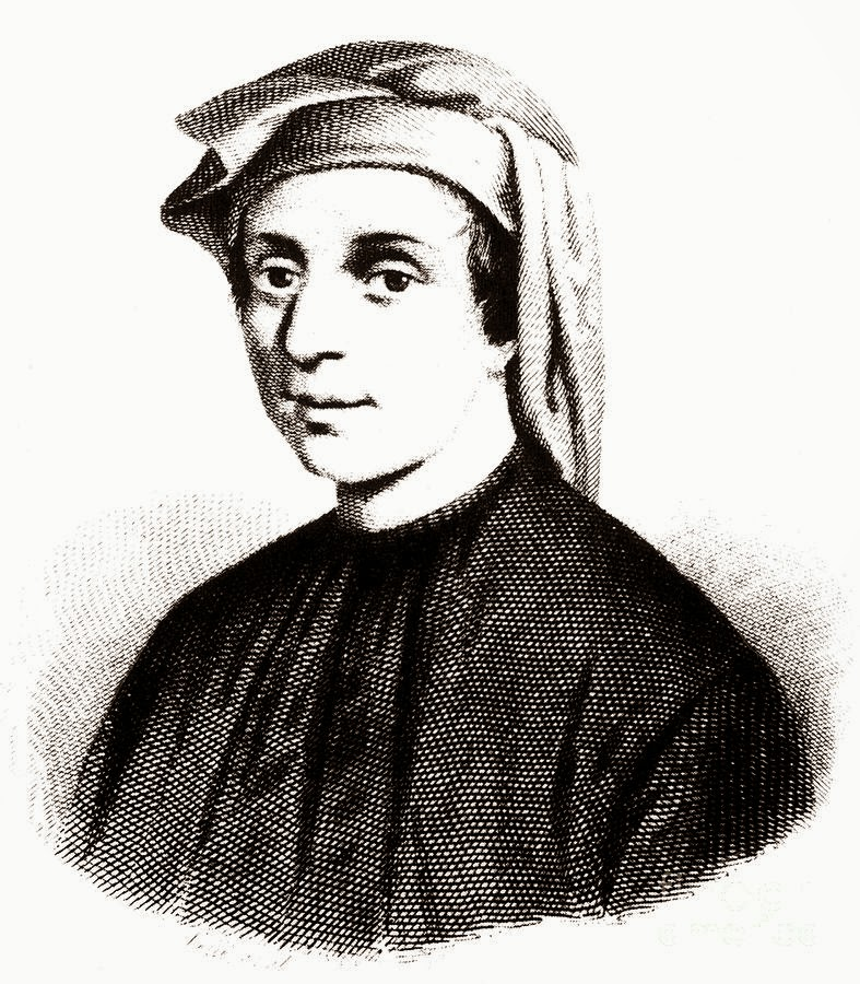 Dall'opera I benefattori dell'umanità; vol. VI, Firenze, Ducci, 1850